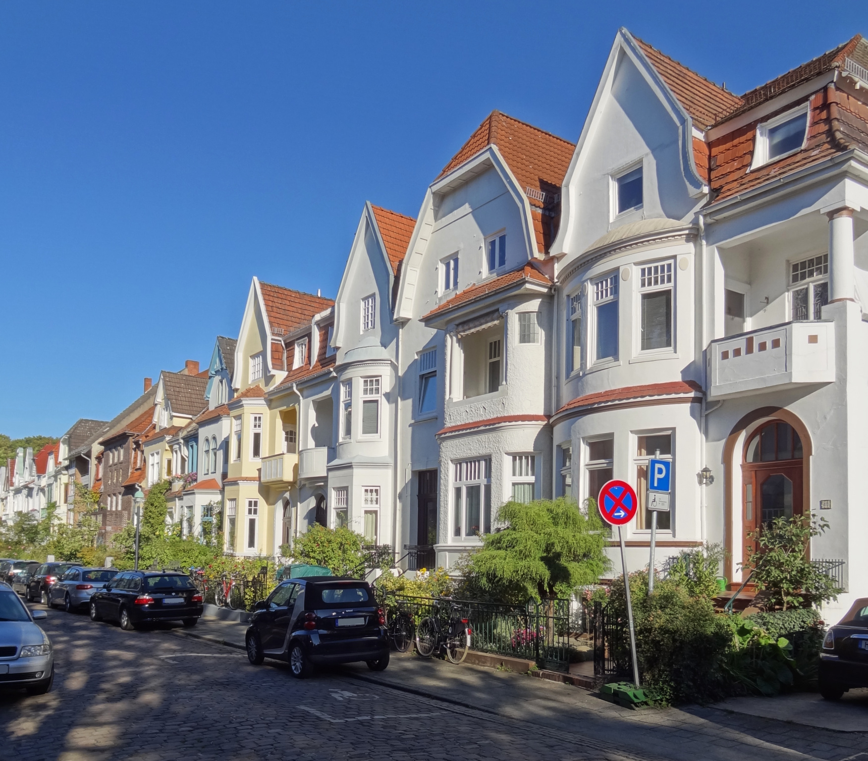 Wohnhausgruppe in Bremen, Bulthauptstraße 3Die Denkmalgruppe ist ein geschütztes Kulturdenkmal in der Freien Hansestadt Bremen, mit der Nr. 0219 beim Landesamt für Denkmalpflege registriert.